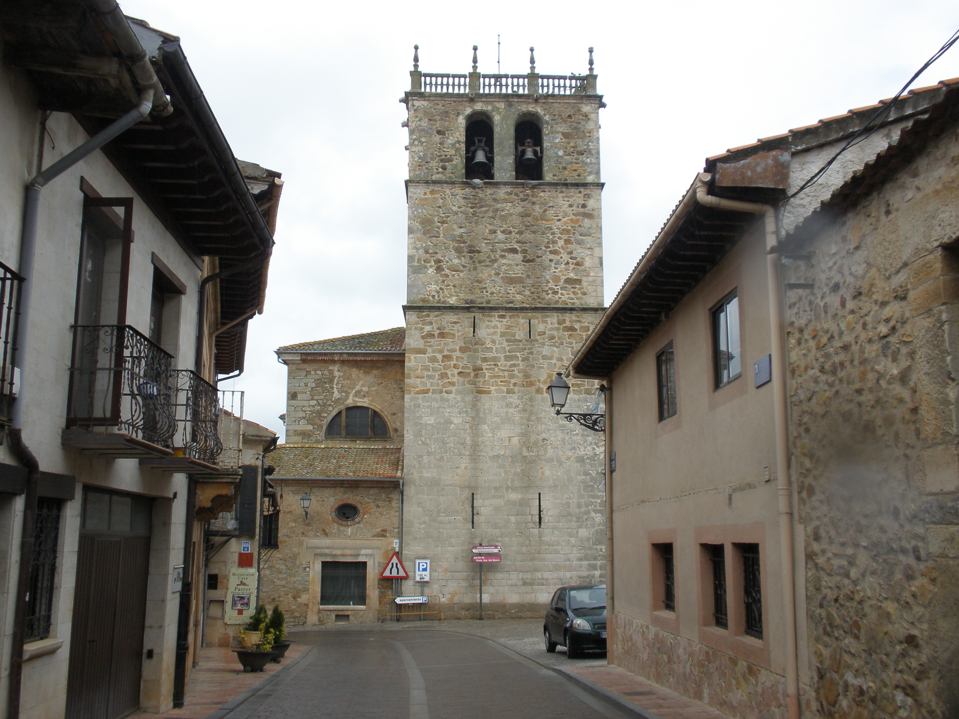 Iglesia de Nuestra Señora del Manto, patrona de Riaza